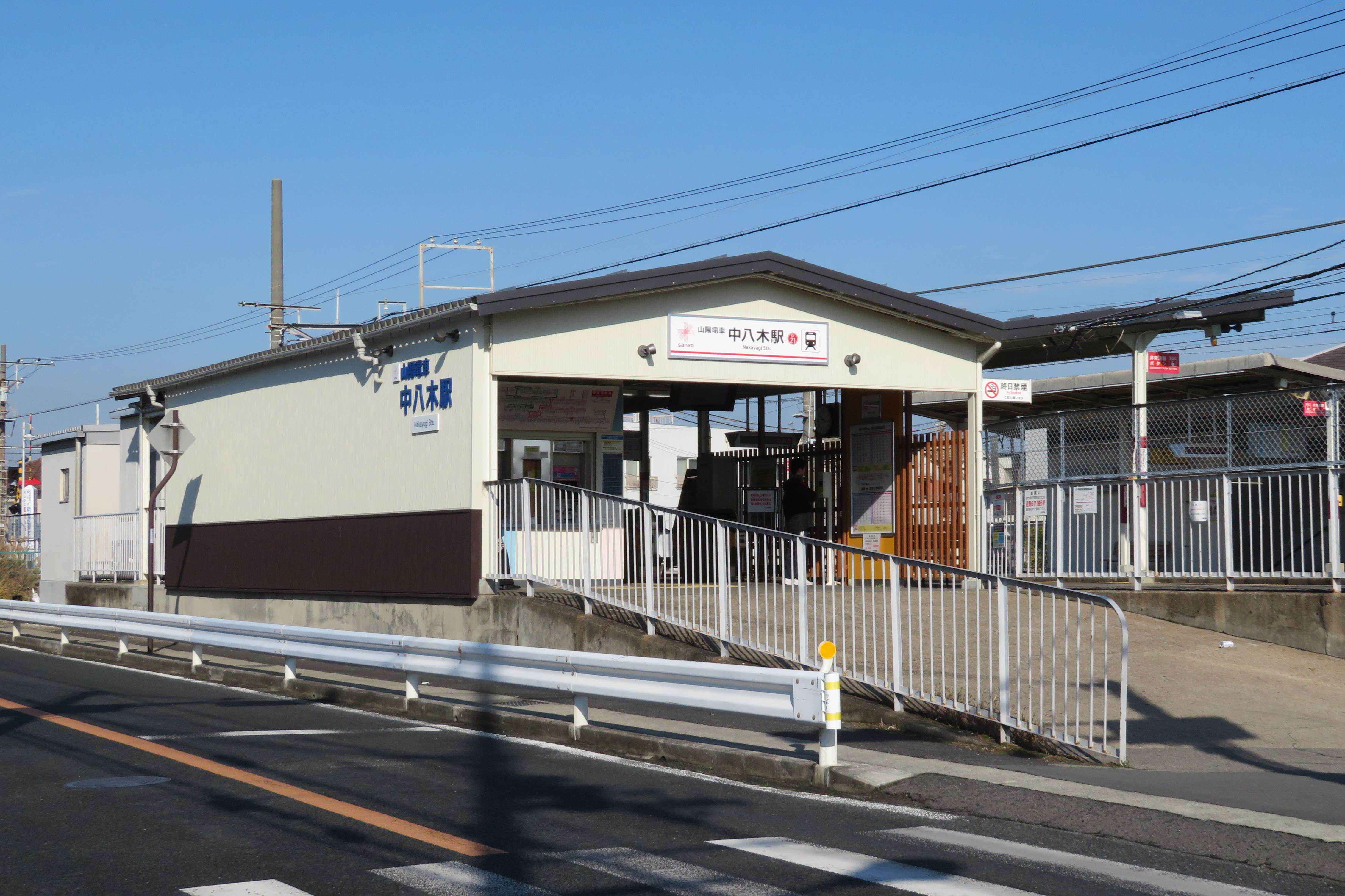 山陽電鉄中八木駅 Canon PowerShot SX730 HS